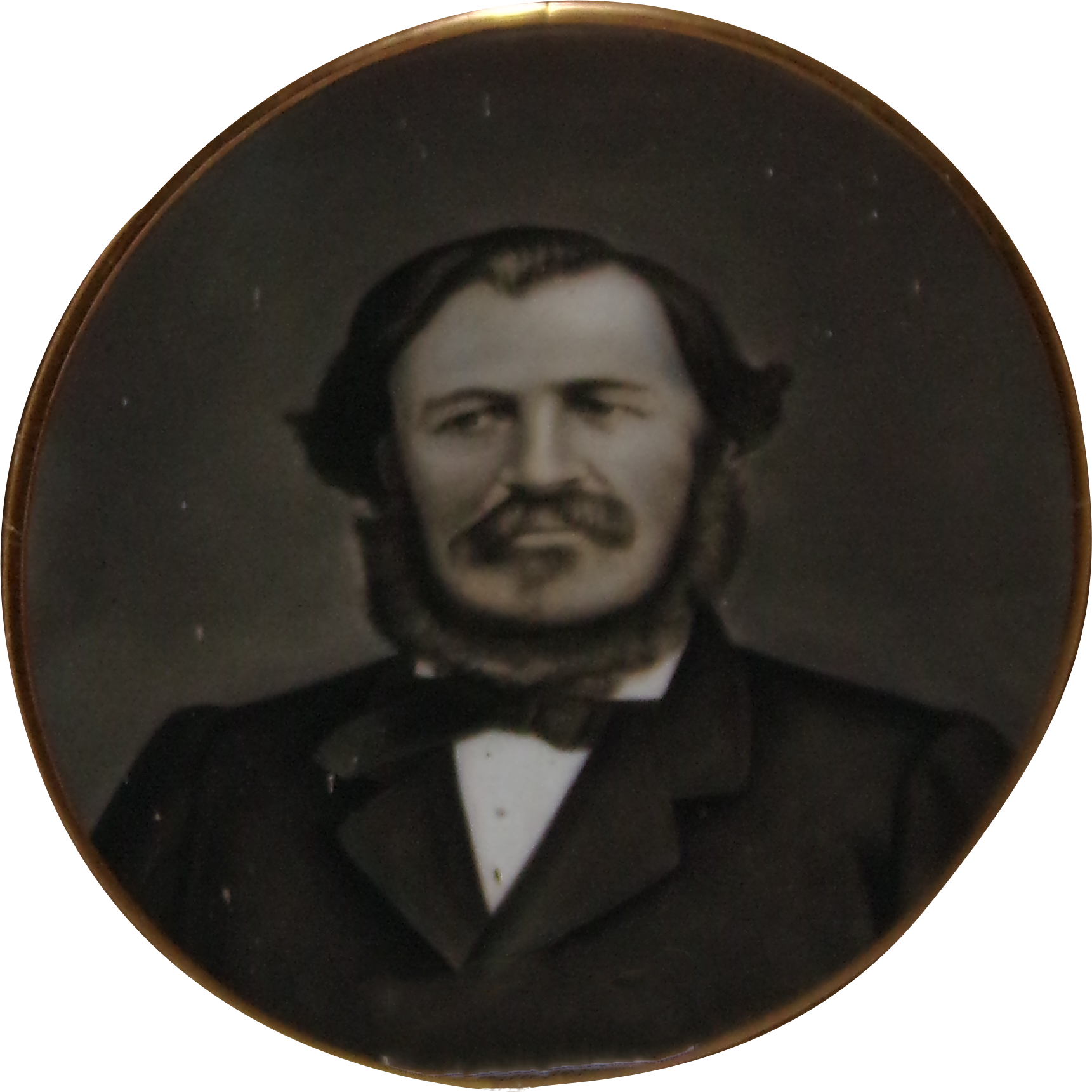 Fotografía coloreada de Rosendo María Fraga, gobernador de Santa Fe entre 1858 y 1860.